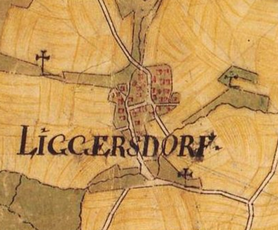 Deutschland (D) - Baden-Württemberg (BW) - Landkreis Konstanz (KN) - Hohenfels - Liggersdorf 1779 Geometrischen Karte über die Deutschordensherrschaft Hohenfels, 85 cm x 72 cm; Ausschnitt Landesarchiv Baden-Württemberg, Abt. Staatsarchiv Sigmaringen Fürstlich Hohenzollernsches Haus- und Domänenarchiv (Dep. 39) / 786-2002 Sammlungen, Nachlässe, Karten und Pläne; Karten / ca. 16.-21. Jh. Online-Findbuch im Angebot des Archivs